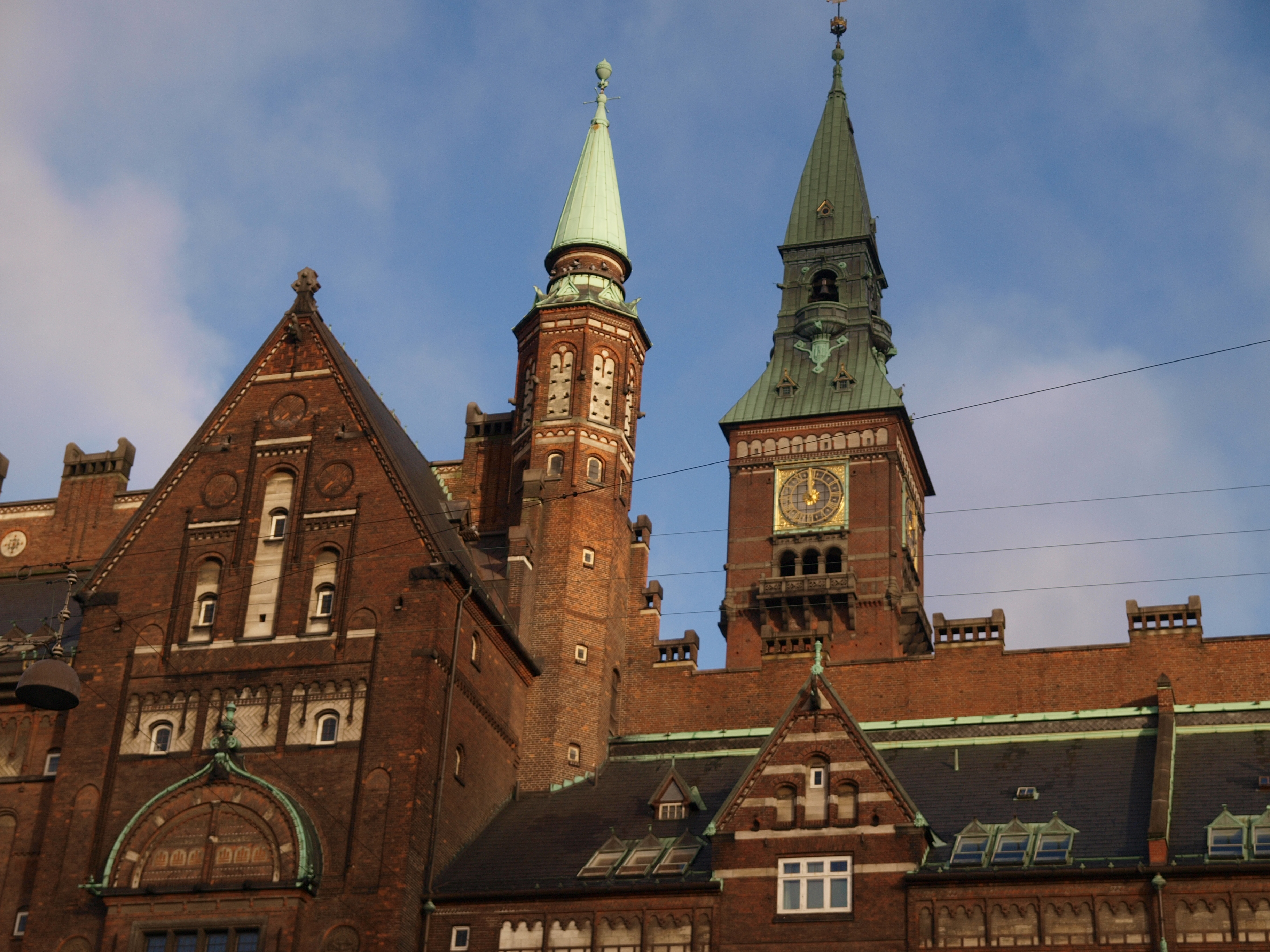 Detail of Copenhagen City Hall in Copenhagen, Denmark